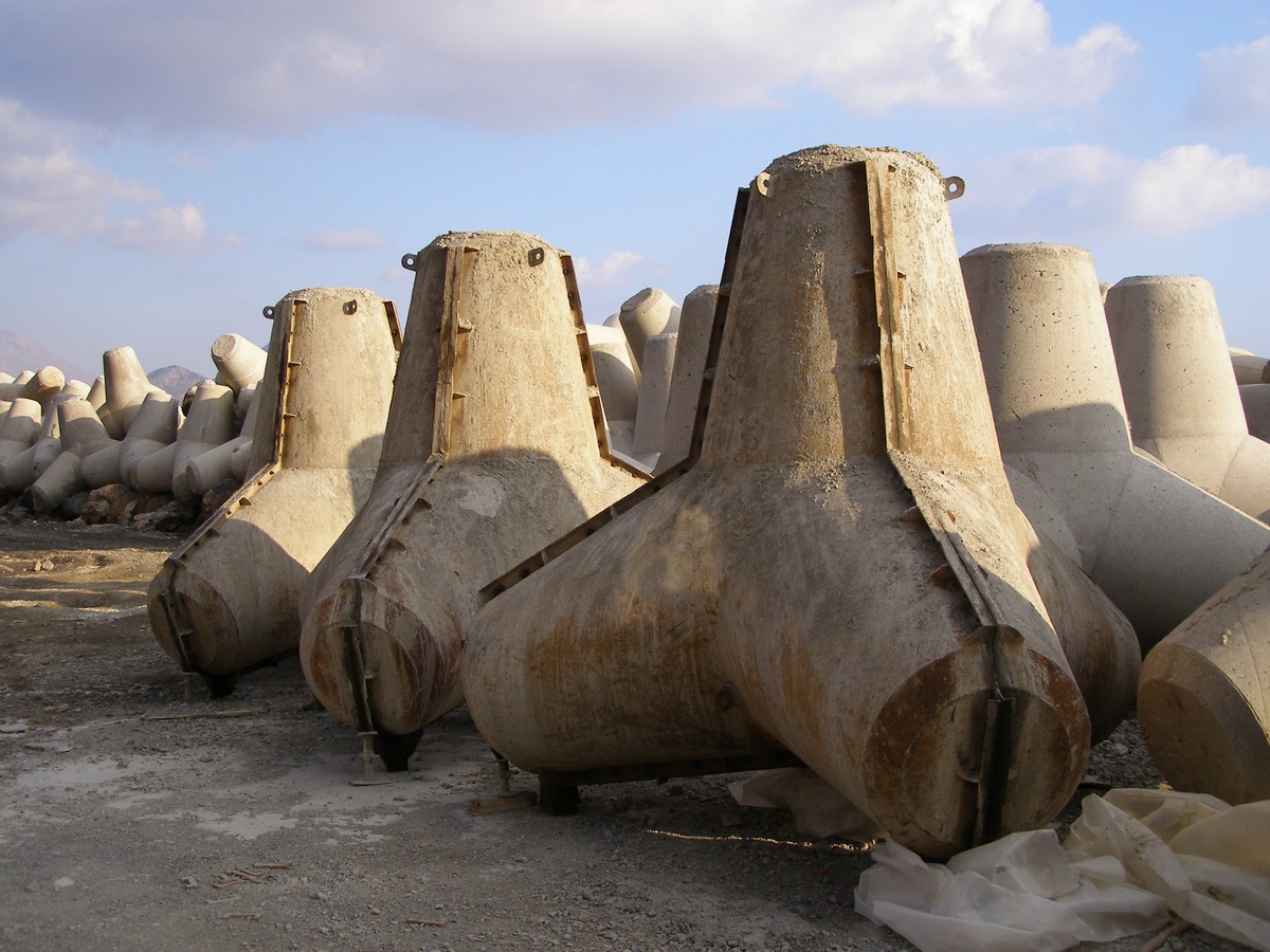 Tetrapoden in ihrer Gussform (Plakias, Kreta)